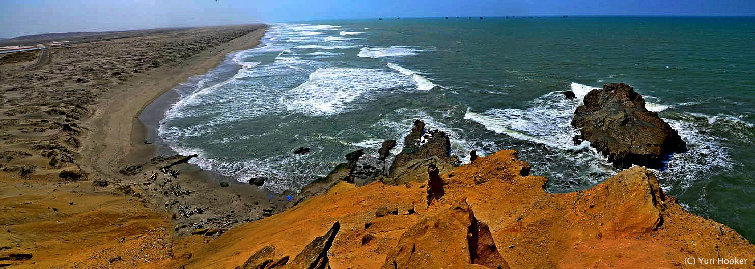 fotografía desde la cumbre de Punta Balcones (Punta Pariñas) hacia el sur